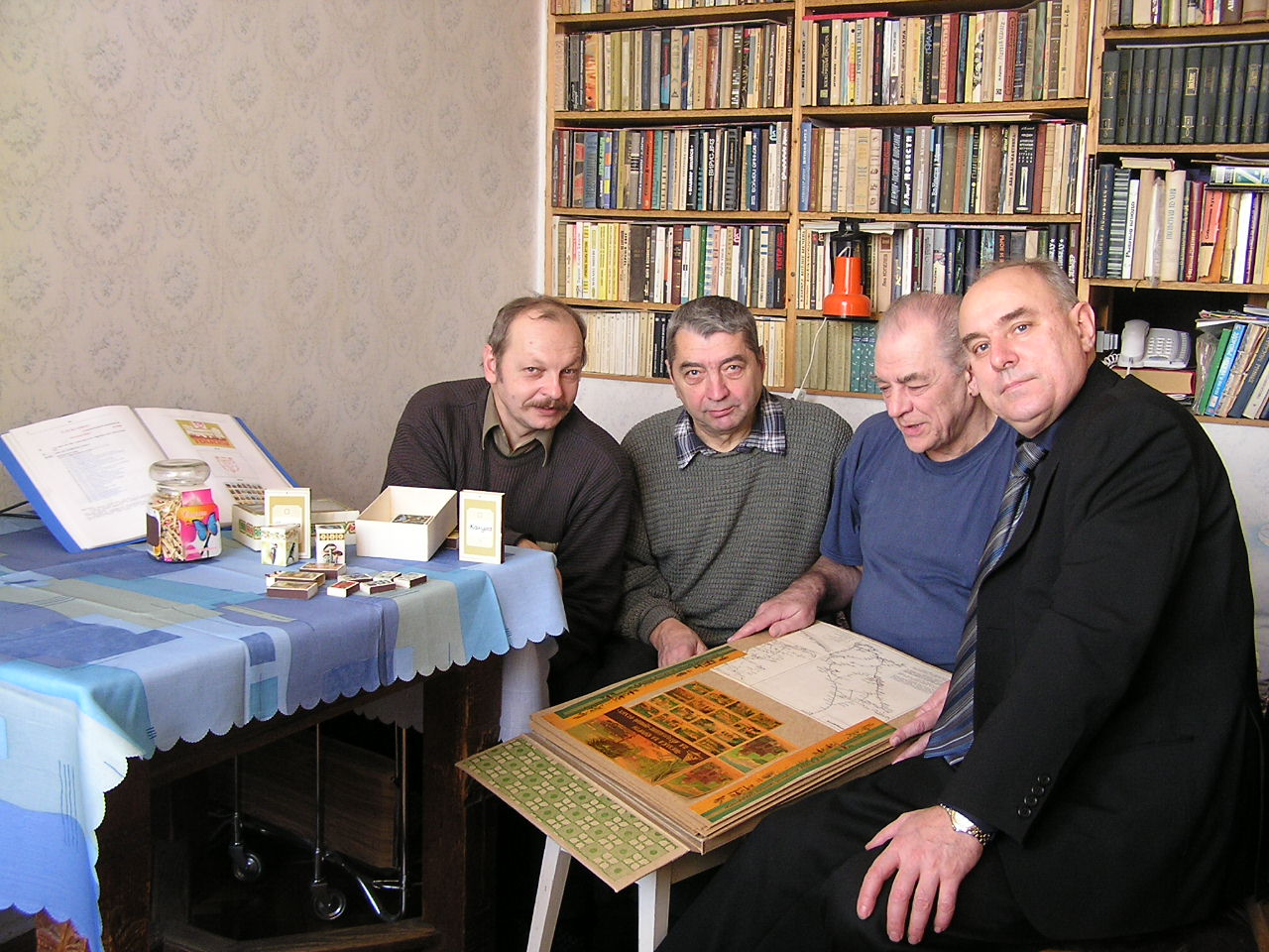 Известные российские филуменисты: Голядкин, Дюпин, Малеев, Скитский.